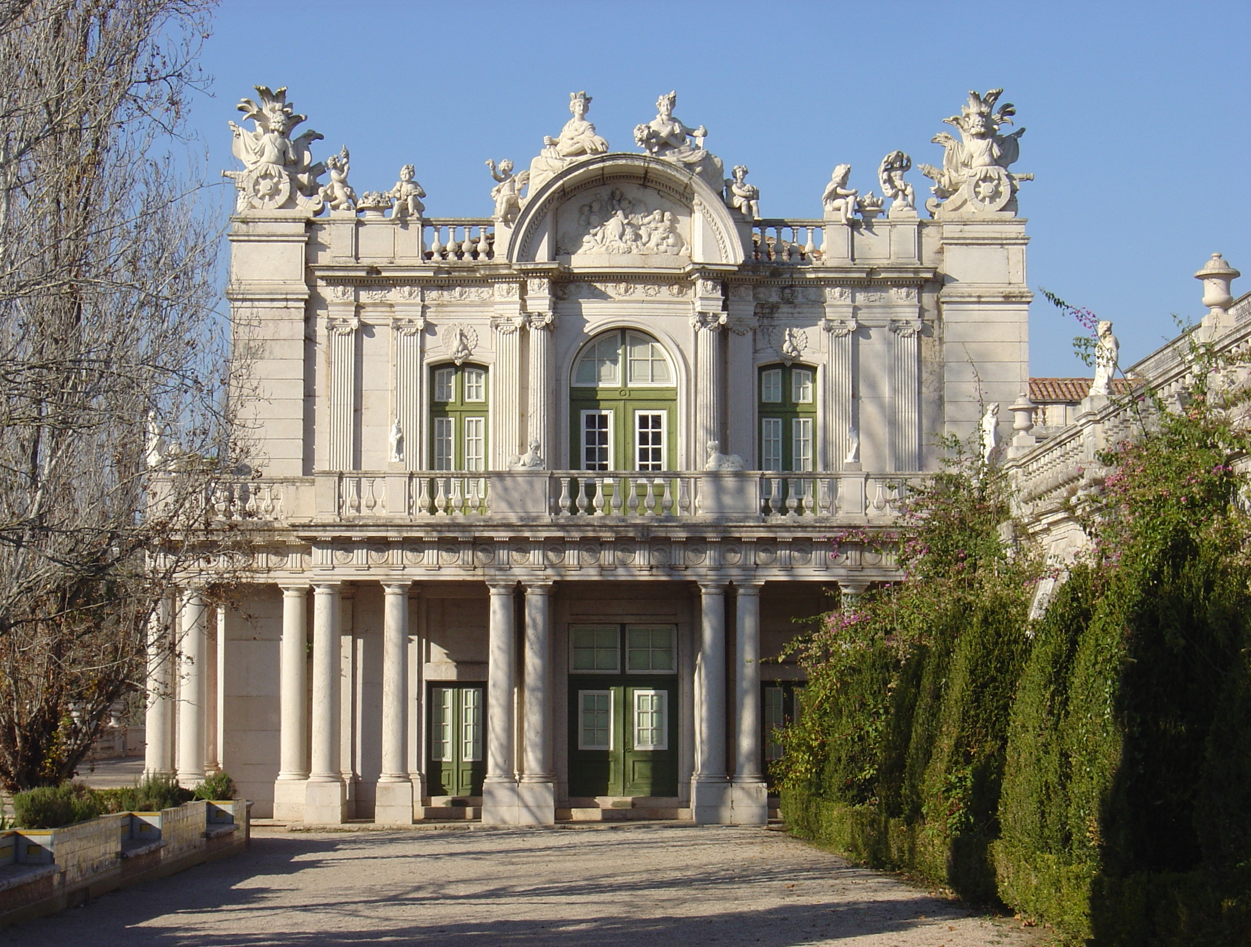 Queluz National Palace, Portugal